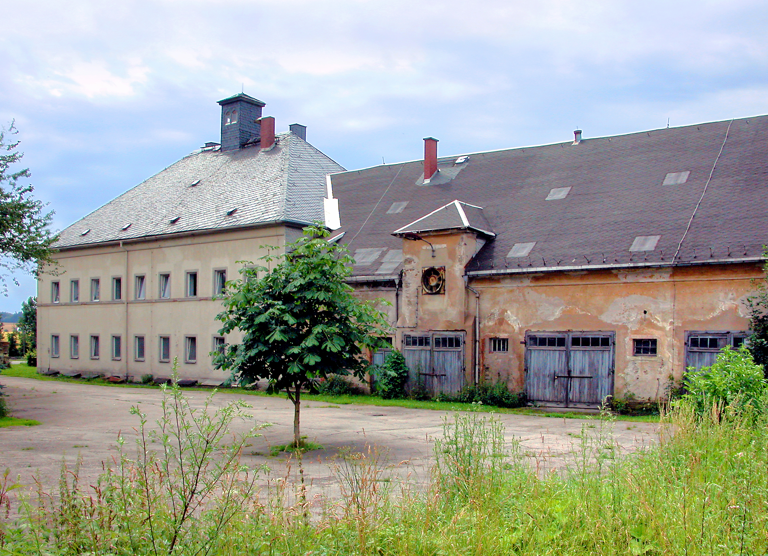 22.07.2009 09496 Heinzebank (zu Hilmersdorf Gemeinde Wolkenstein): An der Heinzebank 8 / Freiberger Straße (GMP: 50.681233,13.120863). Herrenhaus des ehem. Lehnguts Heinzebank, Hofseite. Nach dem Brand von 1848 ließ Johann Traugott Lutze das östlich vom Gasthofes gelegene, heute noch vorhandene Herrenhaus errichten. Nach 1887 wurde das Forstrevier Heinzebank gebildet und das Herrenhaus war der Wohn- und Amtssitz des Forstmeisters. Heute steht das Gebäude überwiegend leer. [DSCN38297.TIF]20090722405DR.JPG(c)Blobelt